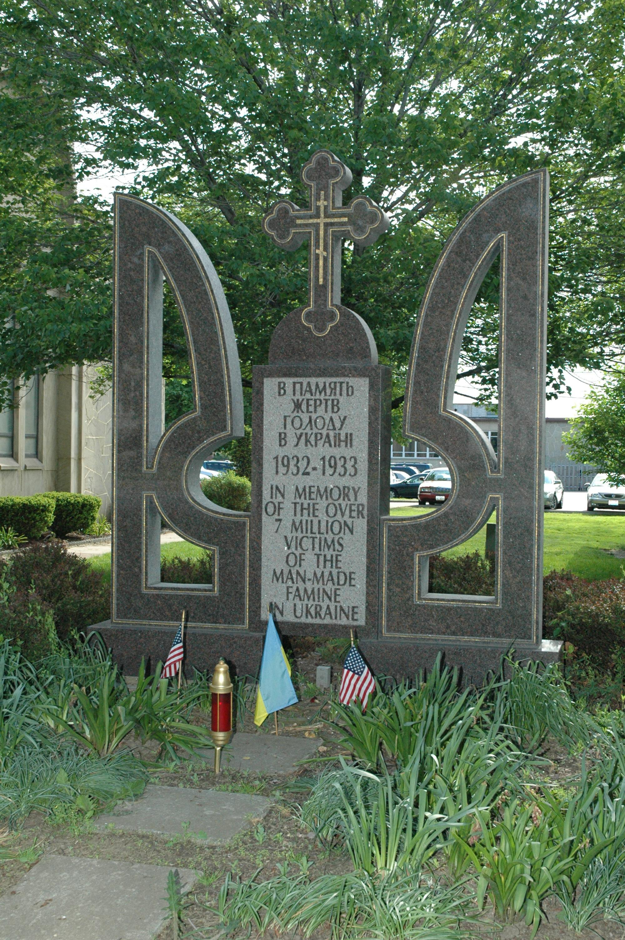 Меморіальний тризуб Українського православного собору св. Володимира в м. Парма, Огайо